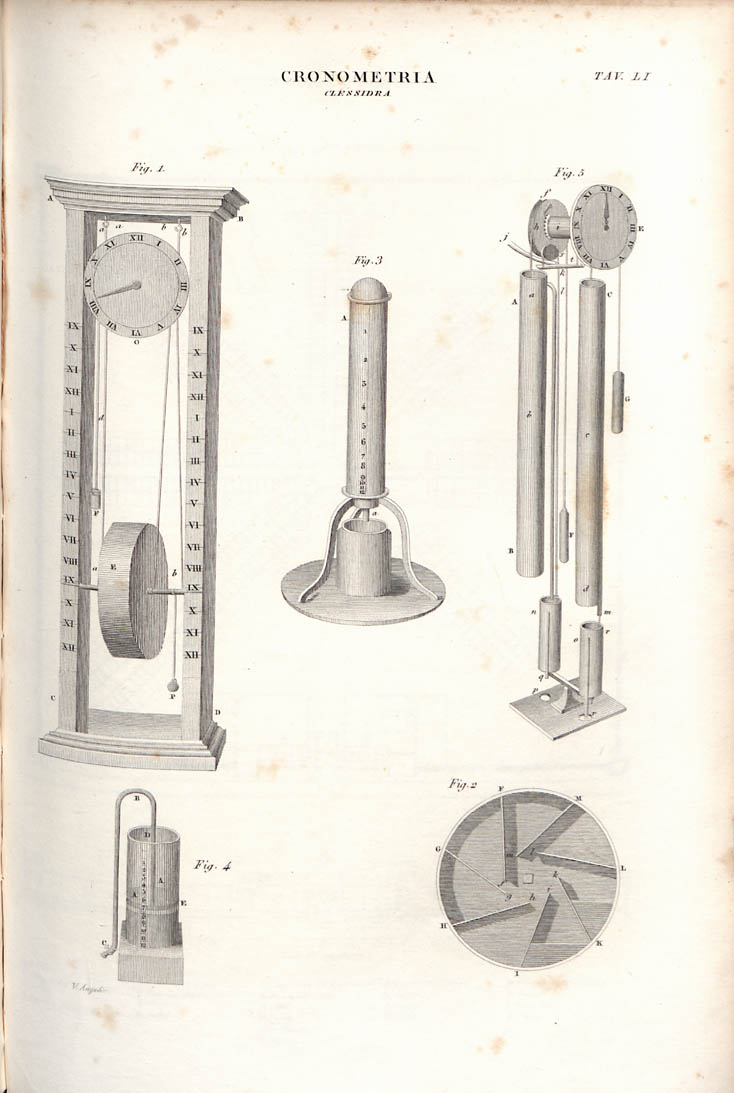 Clessidra tratto da Nuova enciclopedia popolare. 13